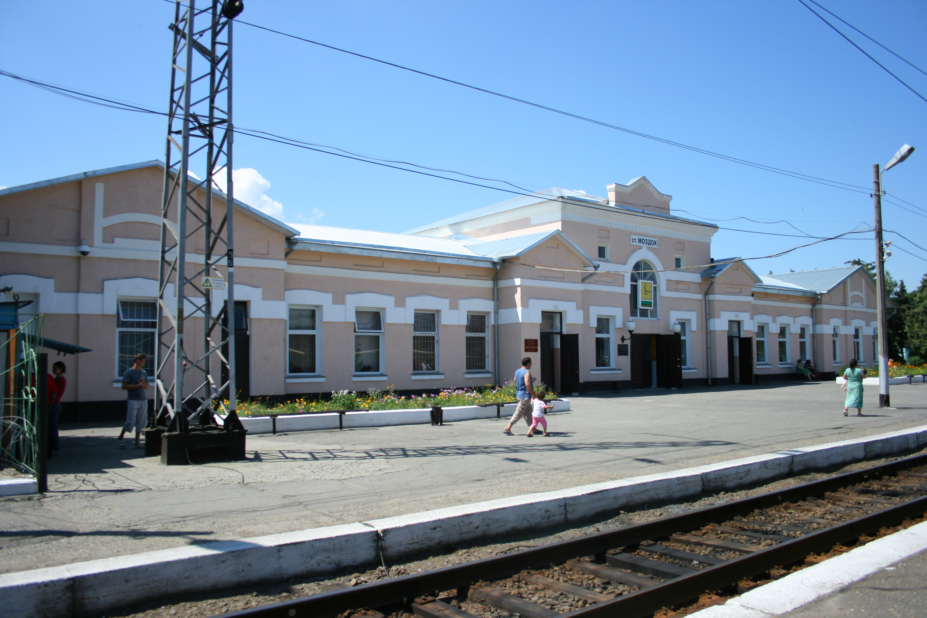 Вокзал ст. Моздок в 2008 г.